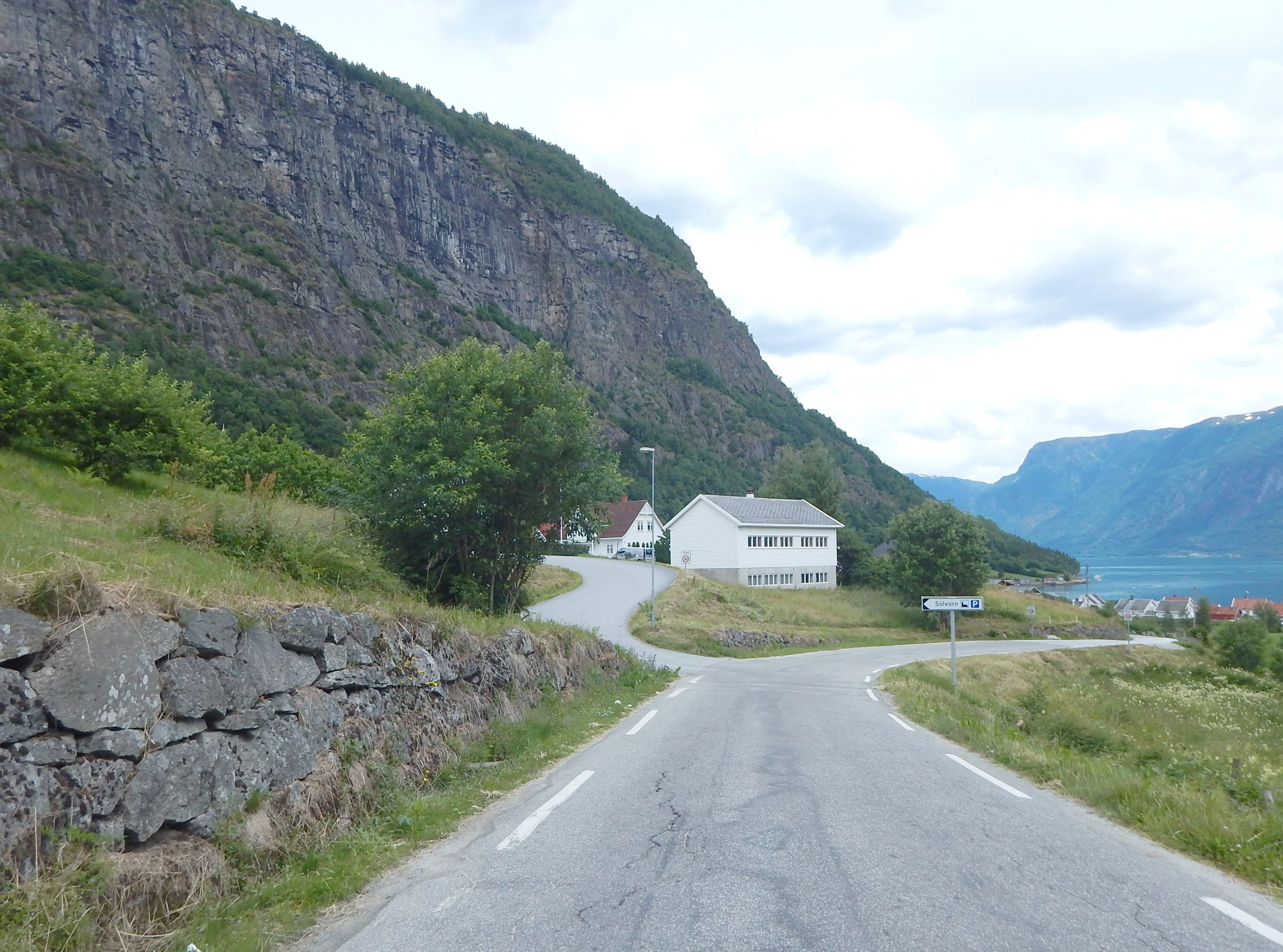 Fylkesvei 338 ned mot Solvorn